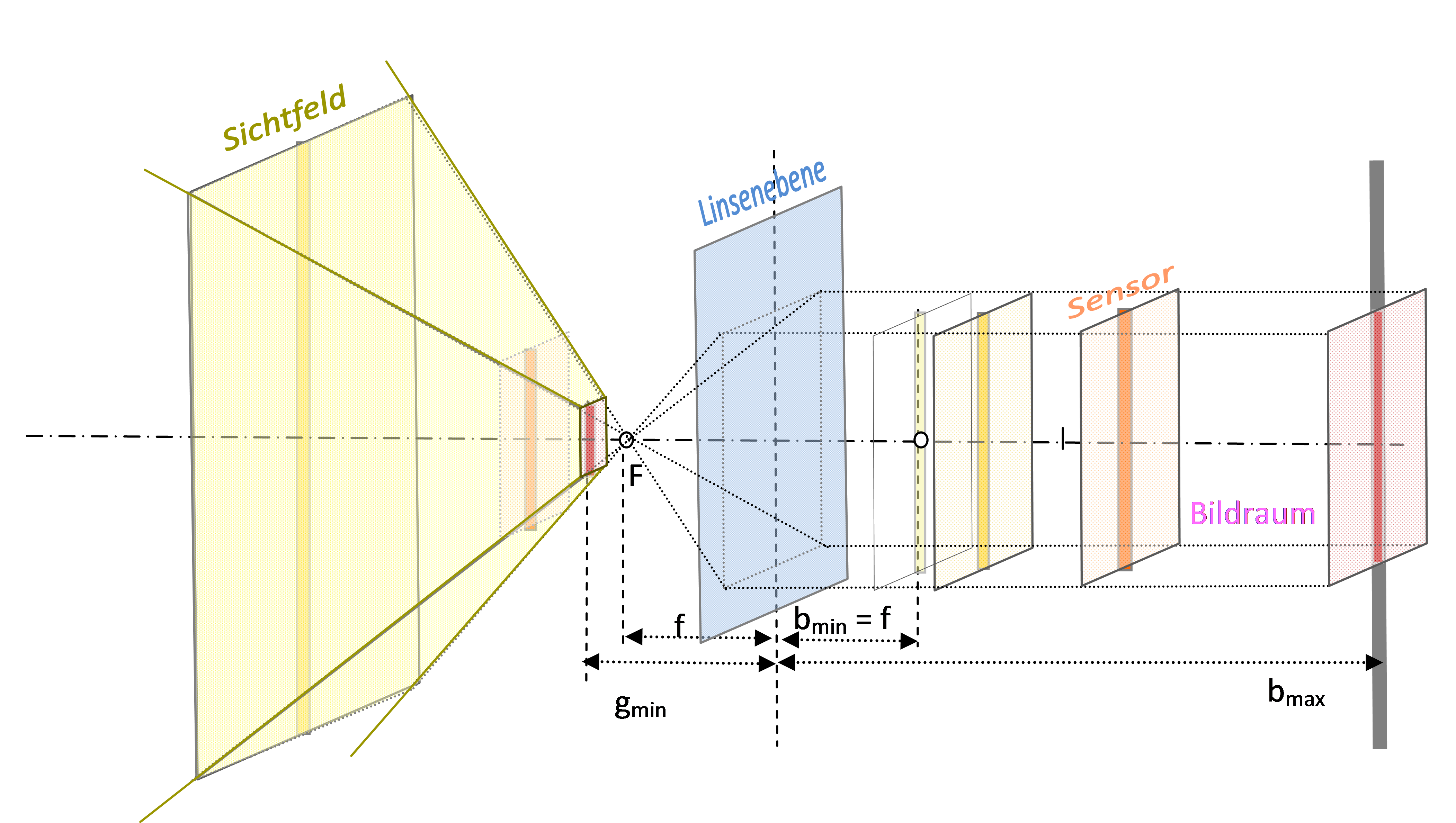 Dreidimensionale Darstellung des quaderförmigen Bildraums einer Kamera und des zugehörigen Sichtfelds als unendlichen Pyramidenstumpf